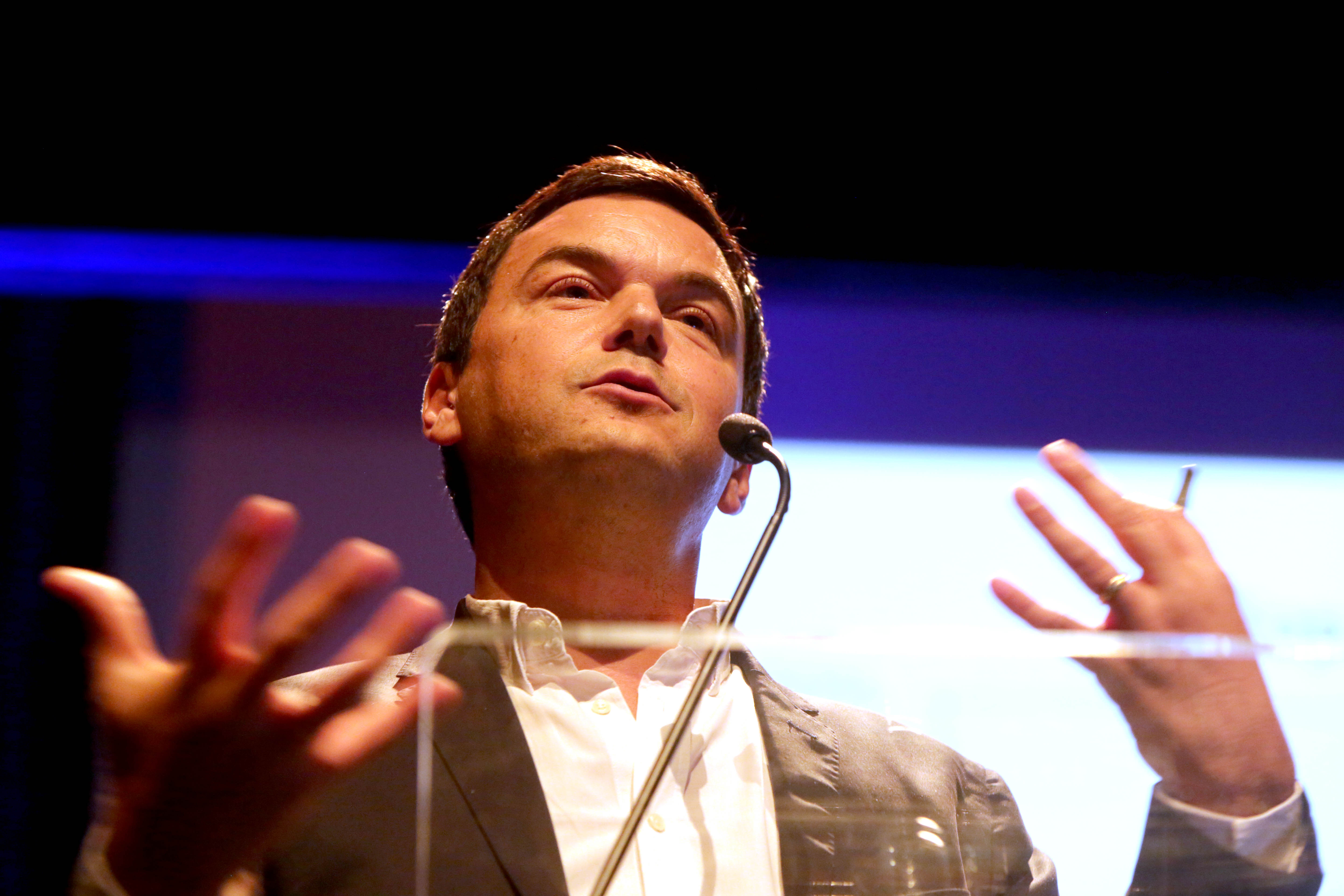 Convidado: Thomas Piketty, economista francês Data: 27 de setembro de 2017 Local: Teatro Santander Crédito das imagens: Fronteiras do Pensamento / Greg Salibian